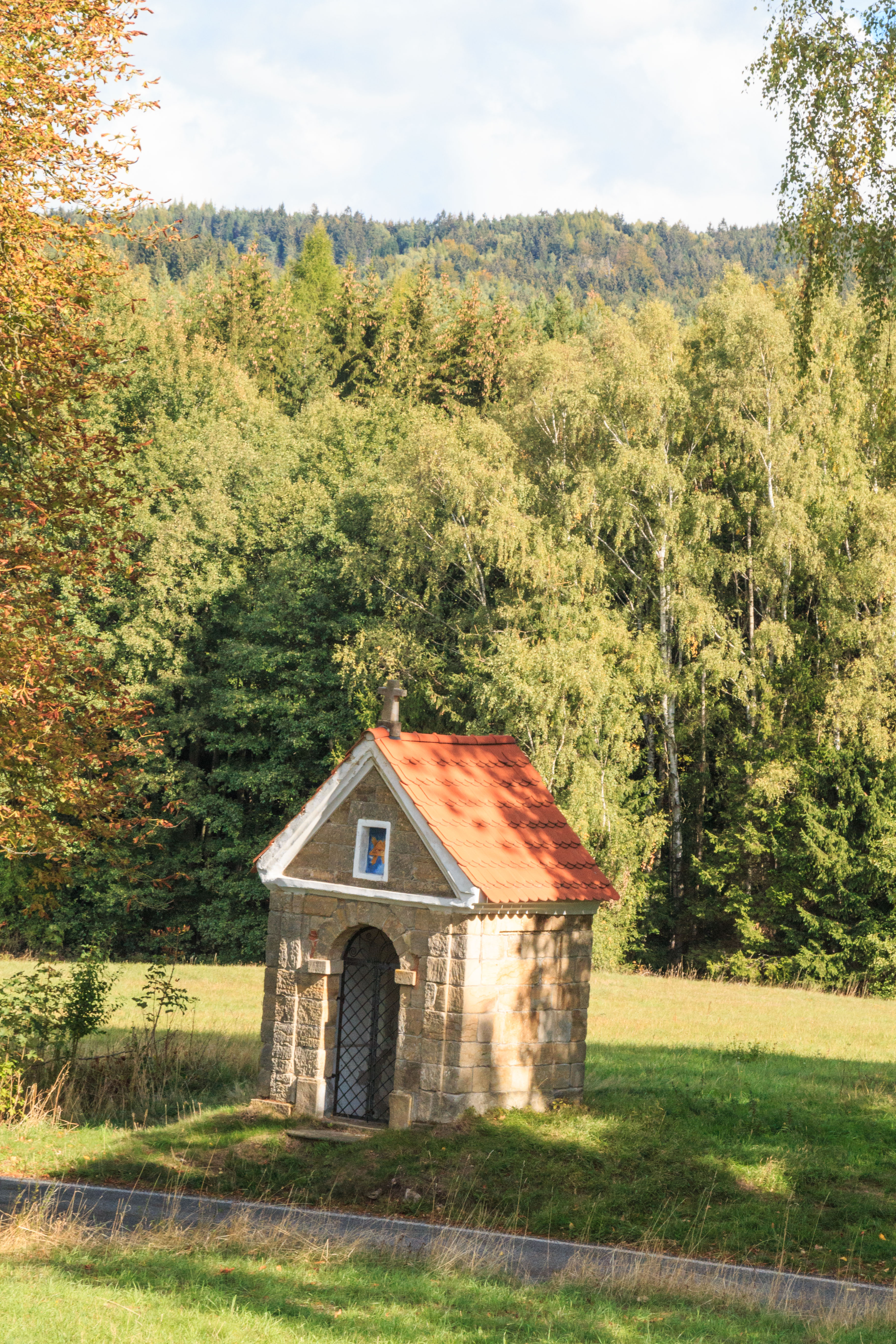 Kaple nad Mařenicemi Project: Vodstvo.